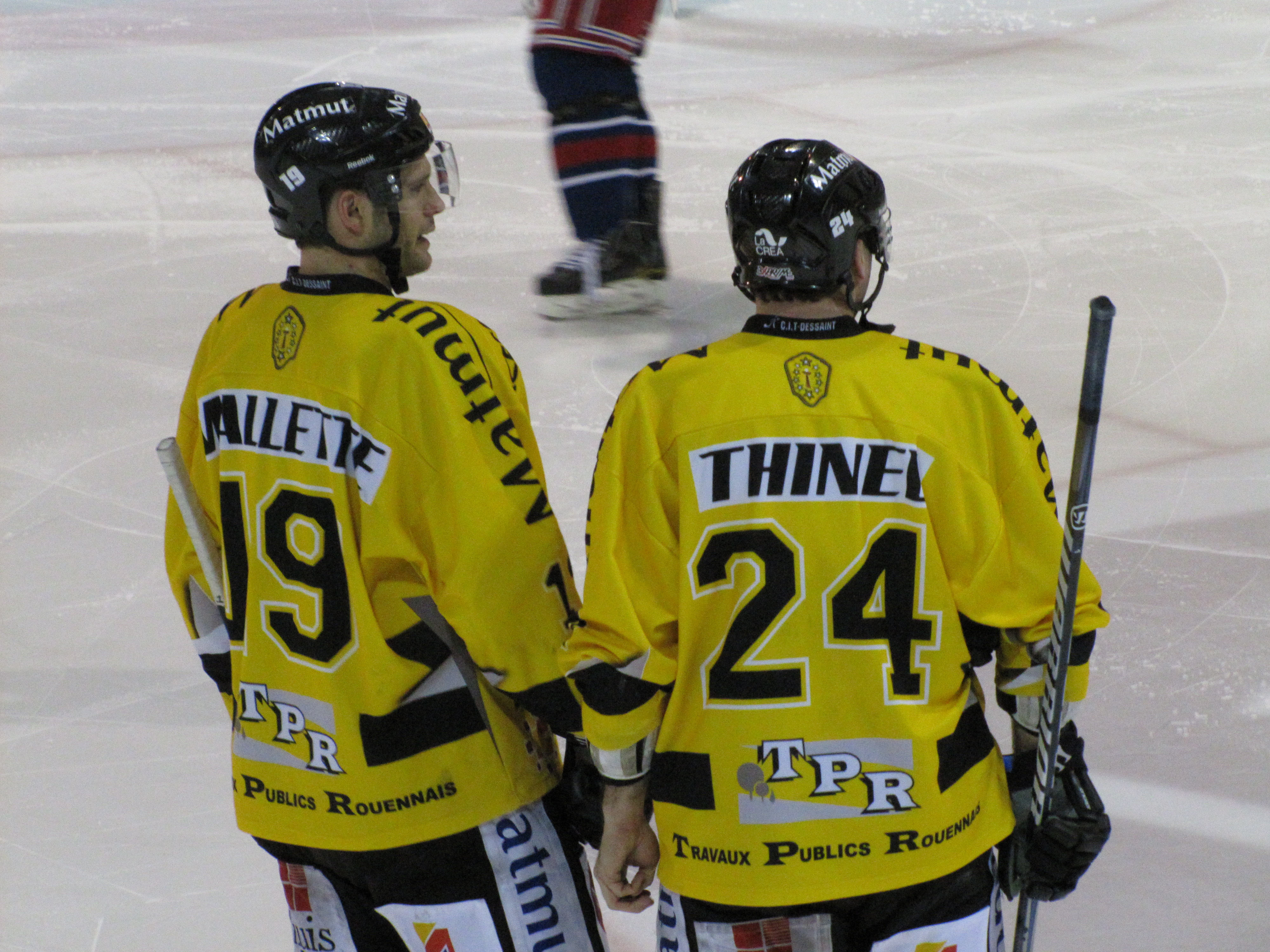 Discussions entre Mallette et Thinel lors de la Coupe Continentale de hockey 2012